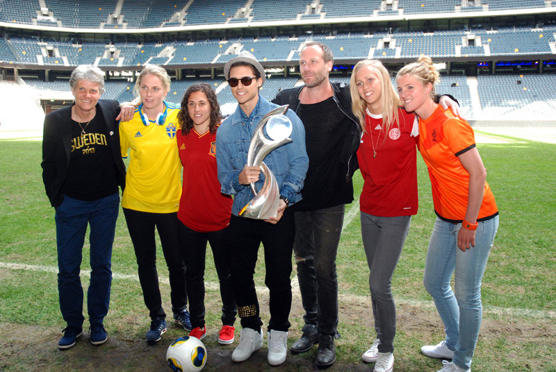 (L-R) Pia Sundhage, Lisa Dahlqvist, Verónica Boquete, Eric Saade, Stefan Örn, Line Røddik Hansen and Kirsten van de Ven unveiling the Euro 2013 theme song at Friends Arena on 27 May 2013